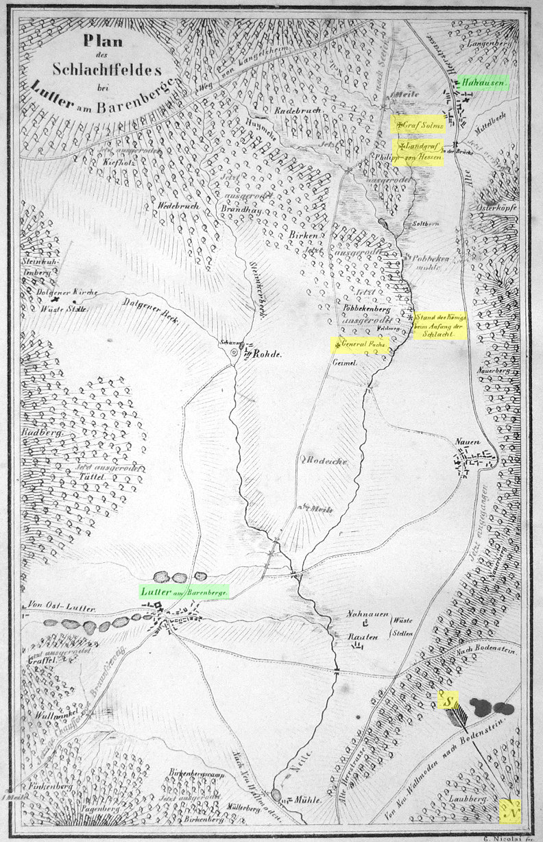 Plan des Schlachtfeldes bei Lutter am Barenberge, Karte etwa 1850 angefertigt; verzeichnet sind u.a. die Stellen, wo Hans Philipp von Fuchs von Bimbach, Hermann Adolph Graf von Solms-Hohensolms und Philipp von Hessen-Kassel gefallen sein sollen.